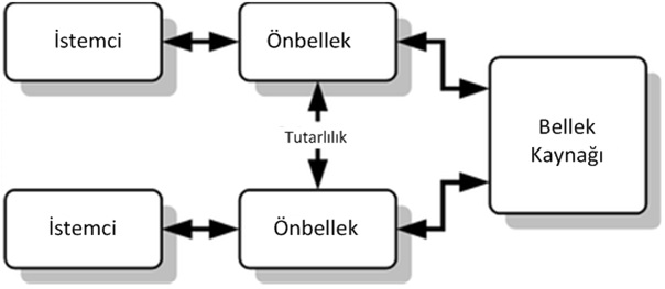 Önbellek tutarlılığını açıklamak için cache coherence ingilizce wikipedia sayfasındaki şeklin türkçeleştirilmişi.